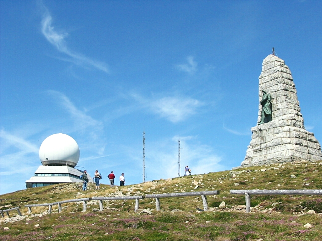 Le sommet du Grand Ballon, massif des Vosges (France).